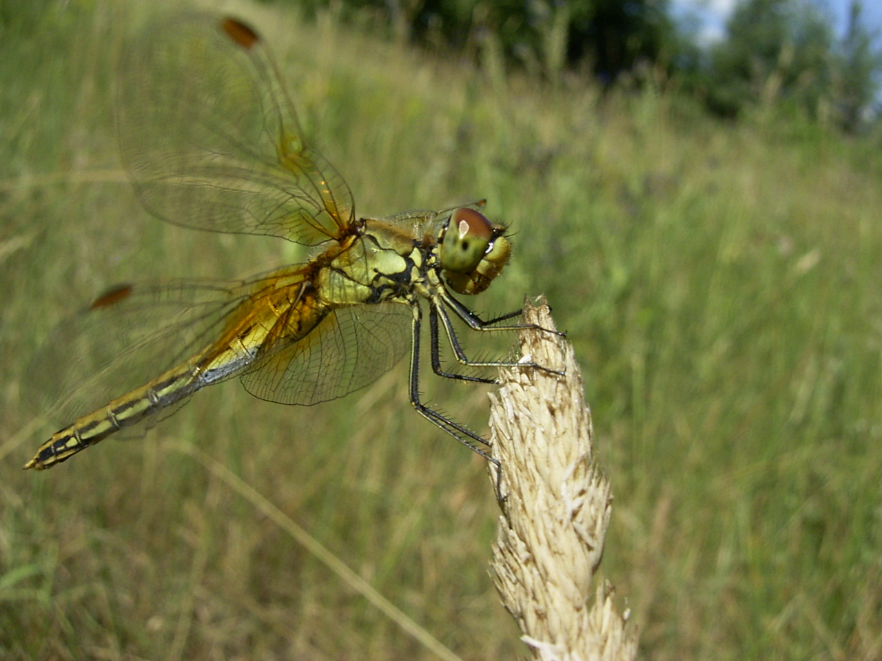 Sympetrum flaveolum